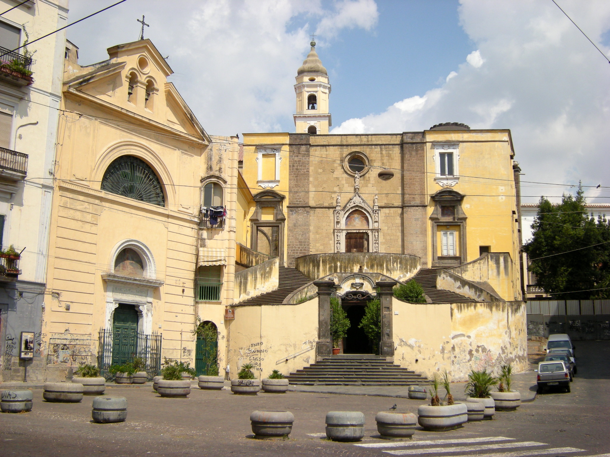 Igreja em Nápoles